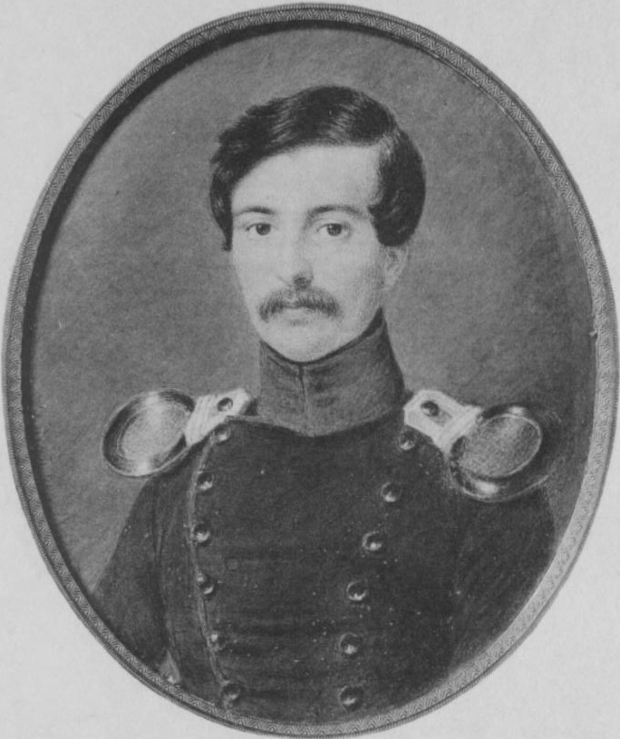 Porträt Cipriano Francisco Gaedechens von Leo Lehmann, Miniatur